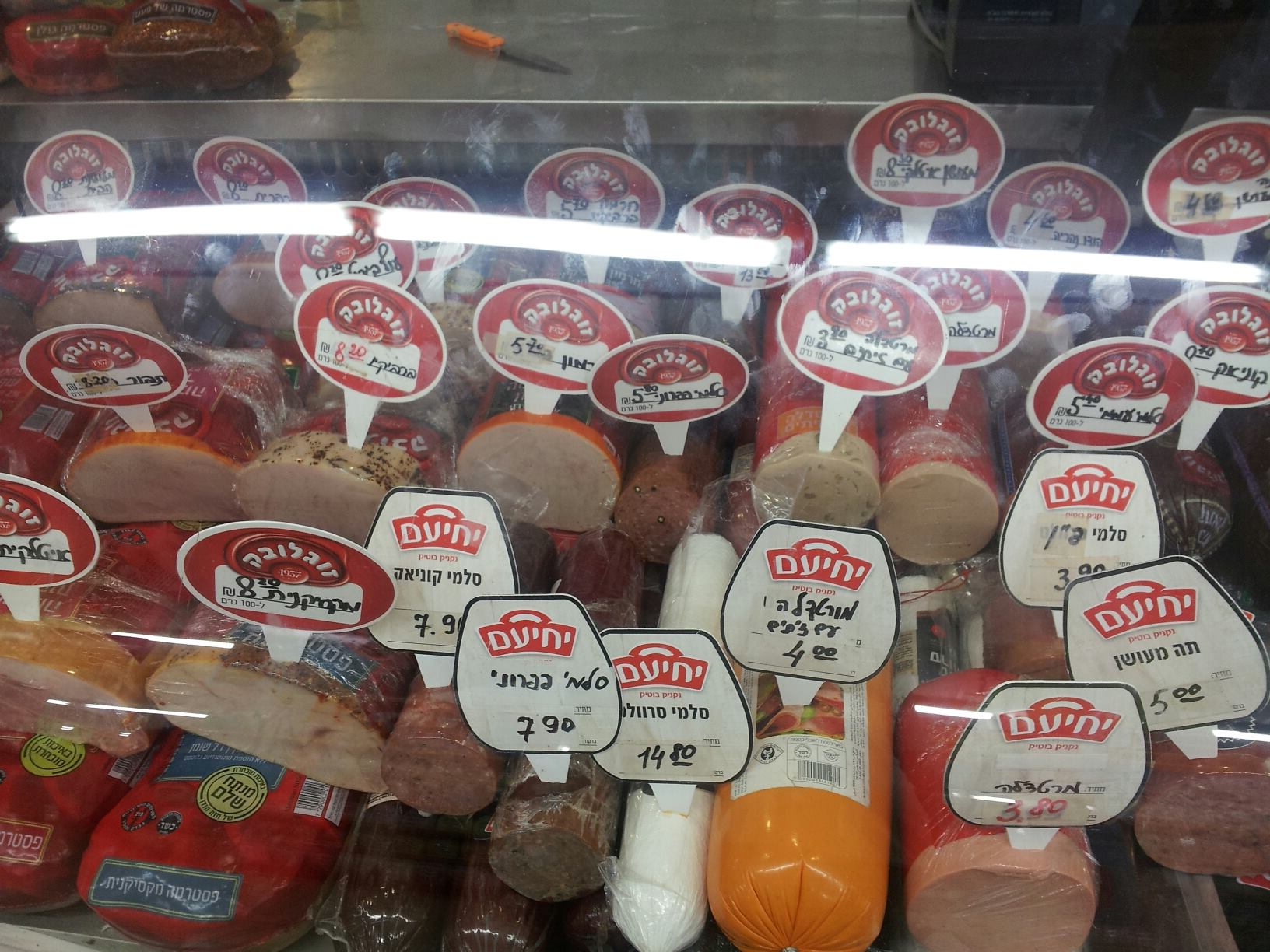 דוכן נקניקים במרכול